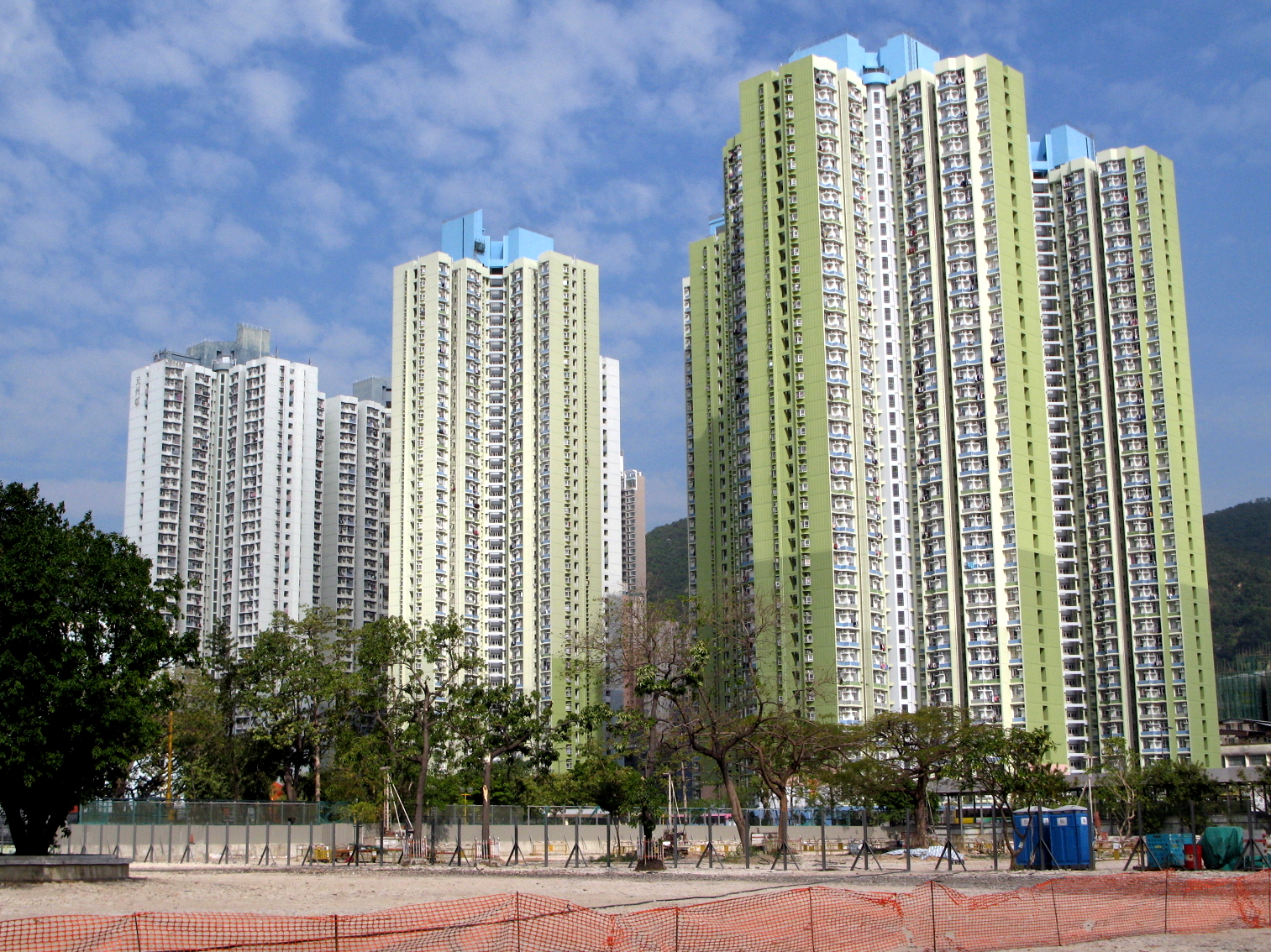 Un Chau Estate 元州邨